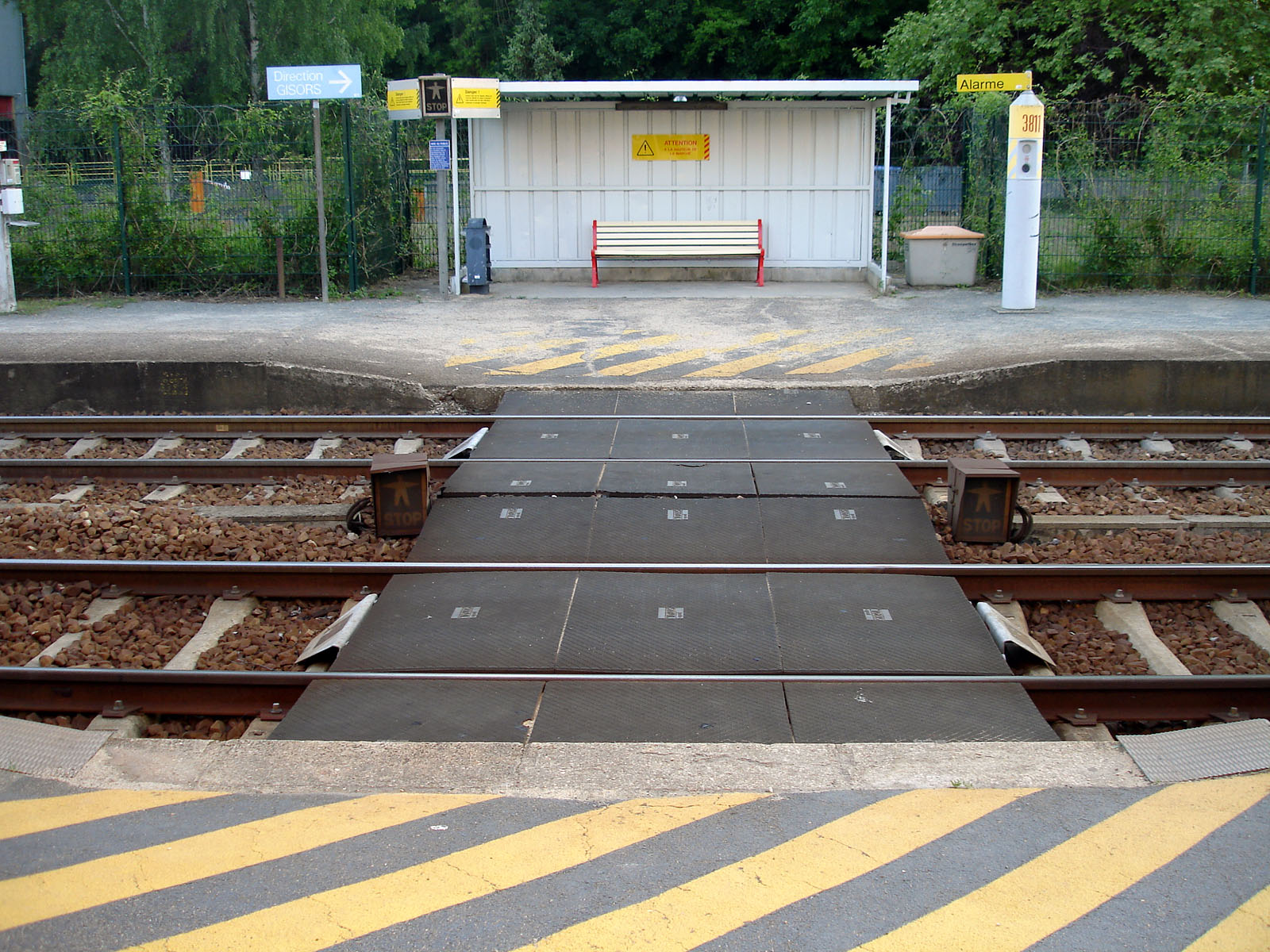 La gare d'Us, Val-d'Oise, France.